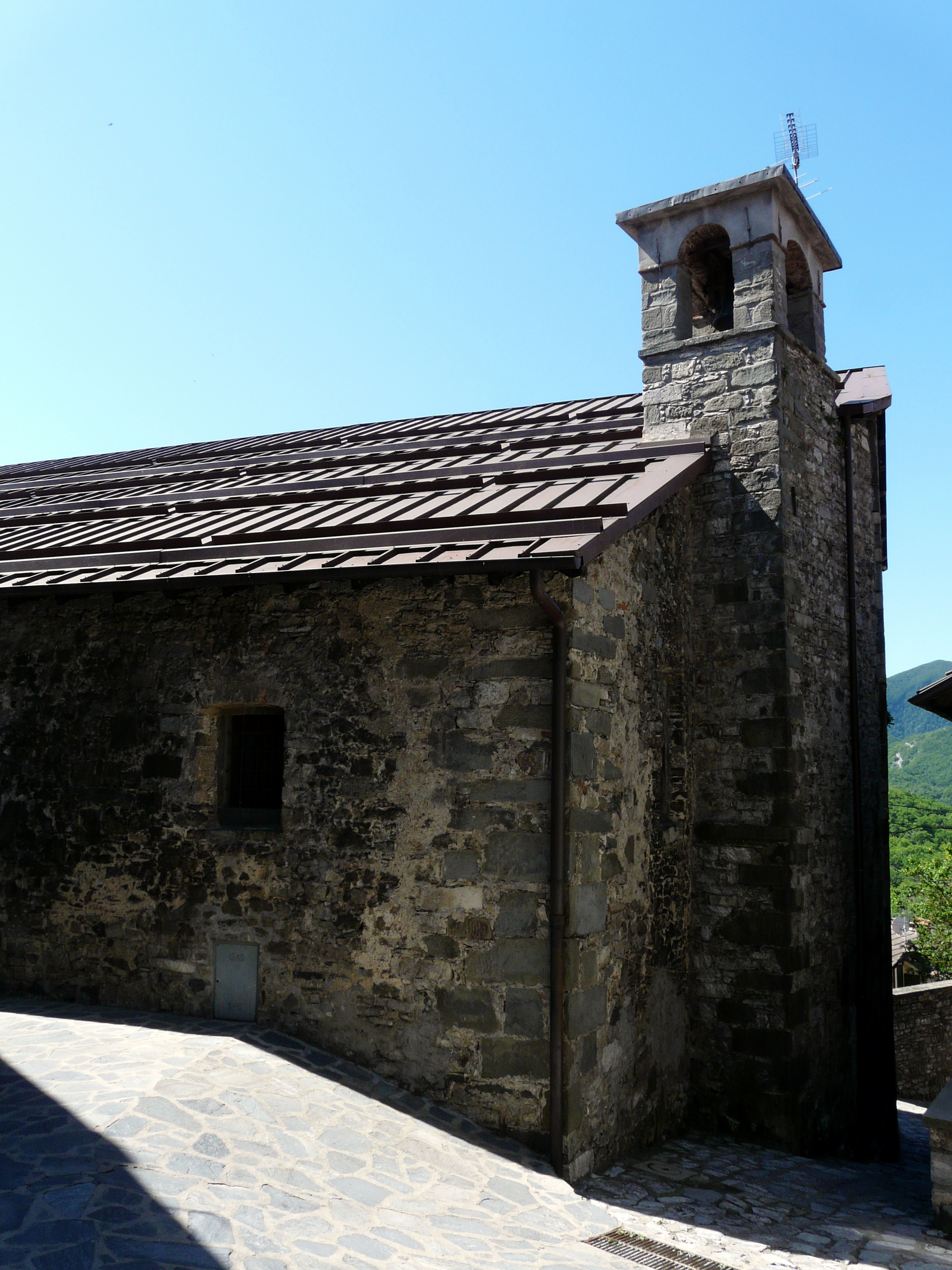 Zona absidale della pieve di San Pietro Porta, Careggine, Toscana, Italia